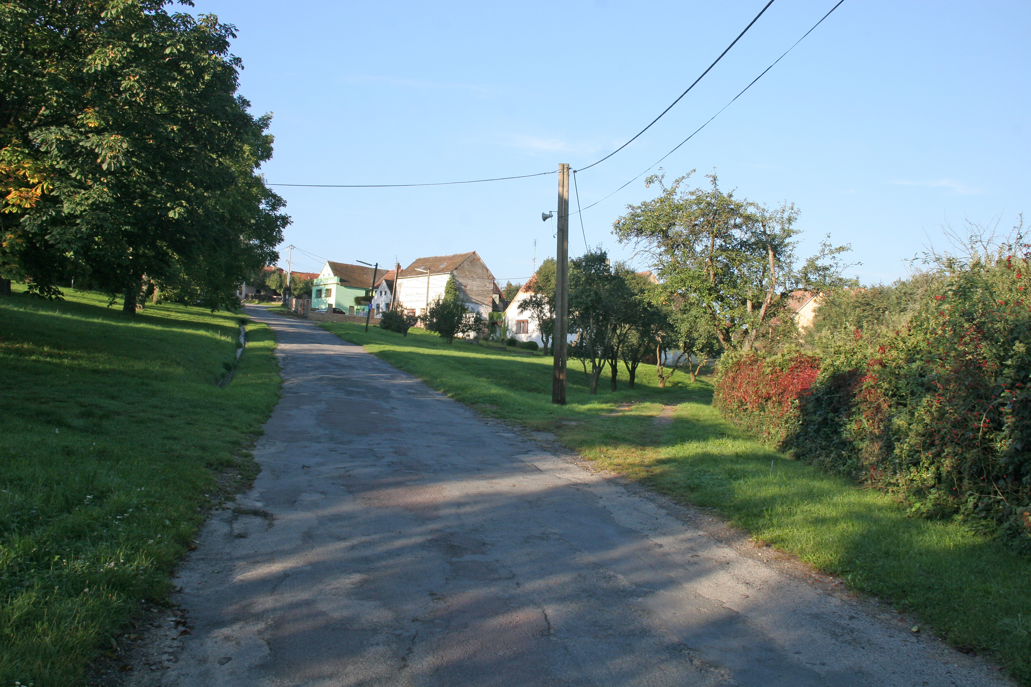 Lukov čp. 49